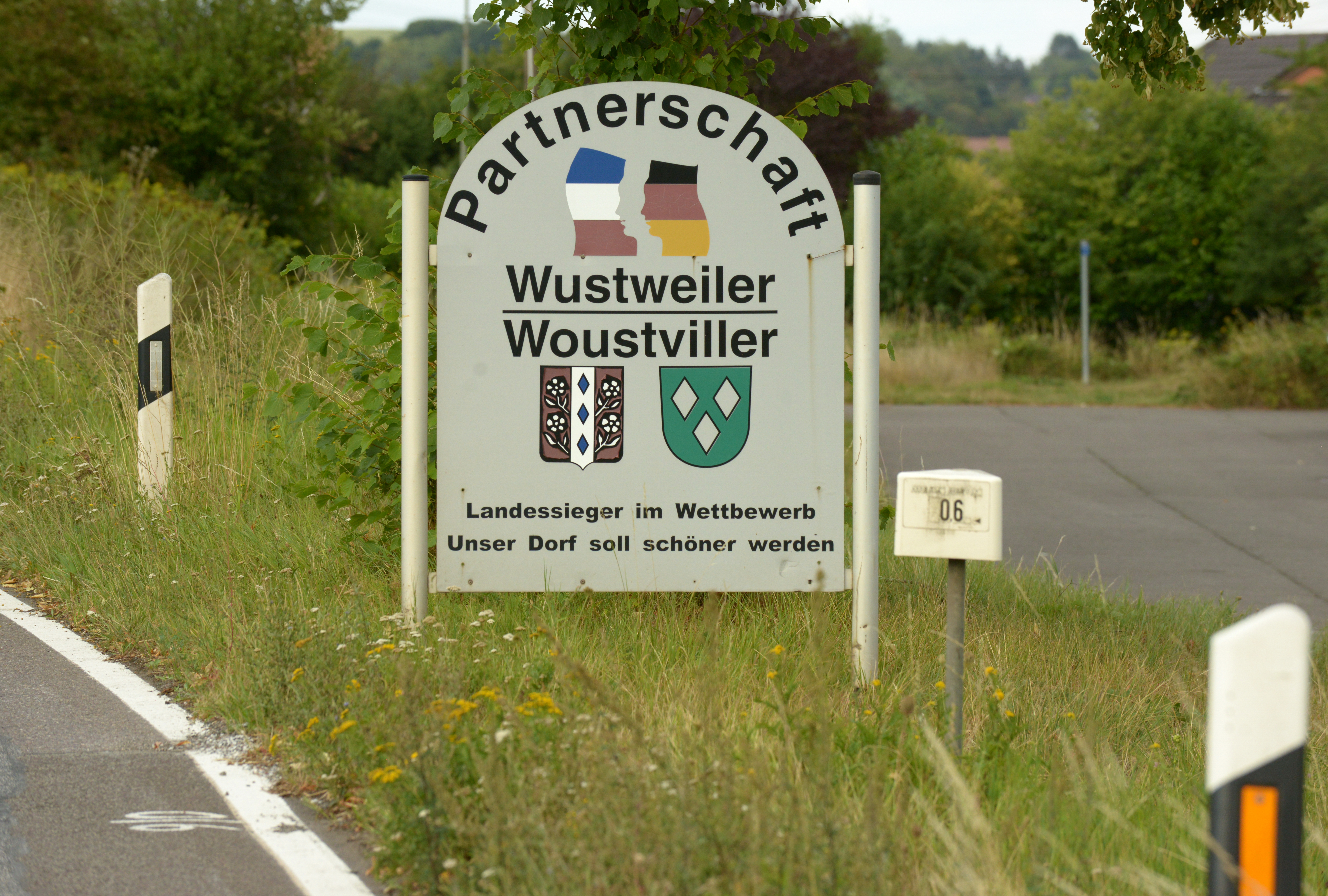 Informationstafel in Wustweiler über die Städtepartnerschaft mit Woustviller. Wustweiler, Gemeinde Illingen, Saarland/ Deutschland (2020).